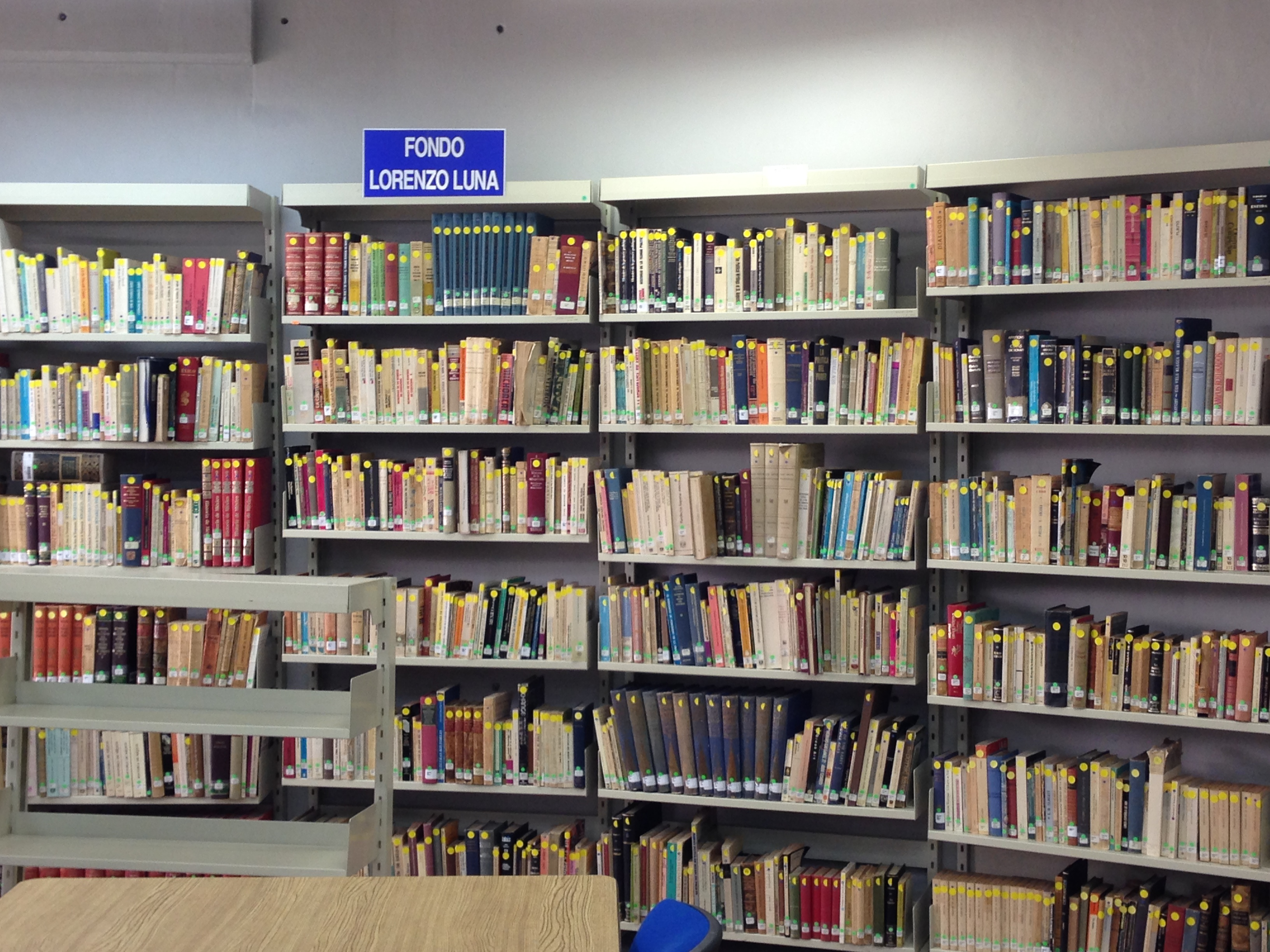 Fondo Lorenzo Luna en la biblioteca del Instituto de Investigaciones sobre la Universidad y la Educación, UNAM.